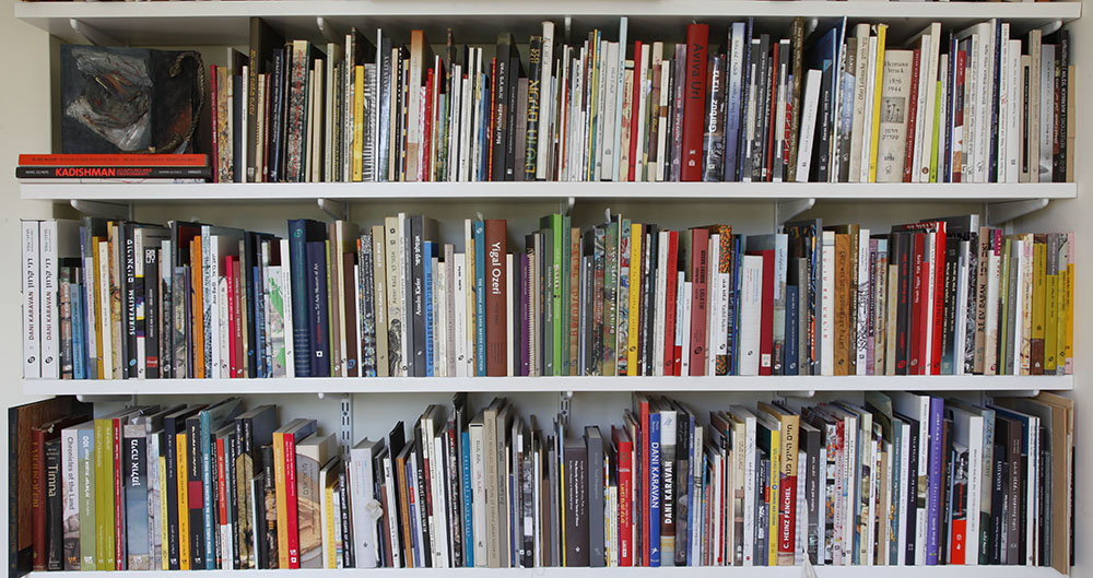 אברהם חי - קטלוגים